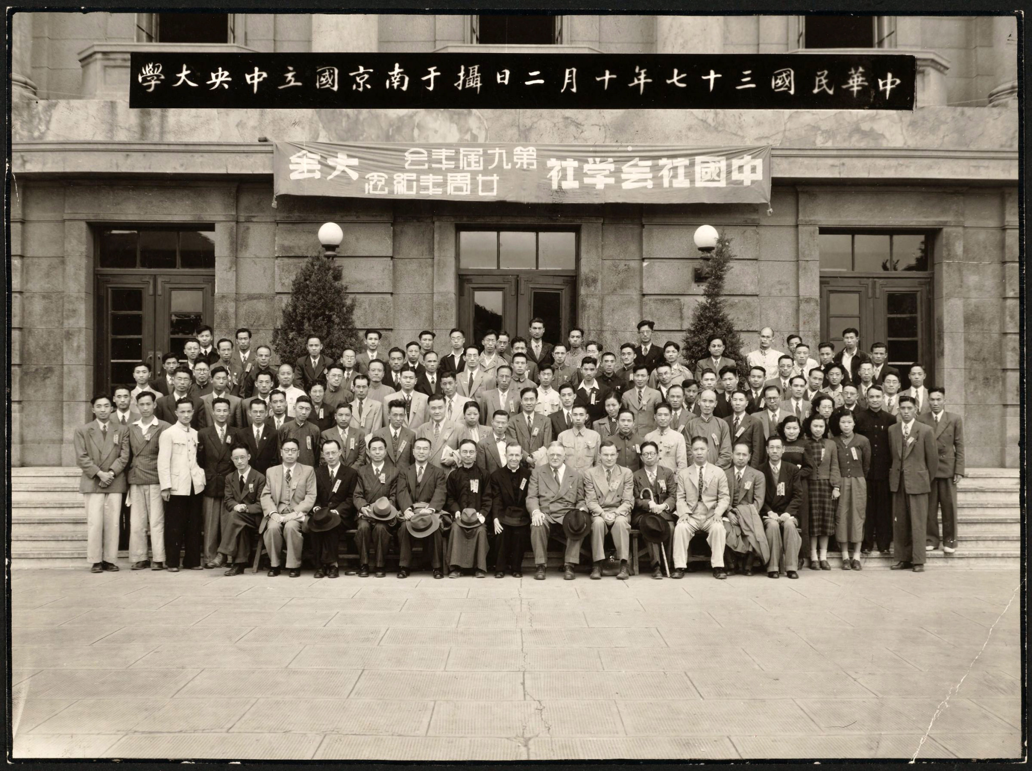 中華民國三十七年（1948）十月二日，位於南京市的國立中央大學，中國社會學社第九屆年會二十周年紀念大會。